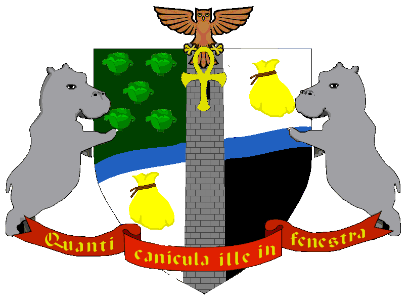 Escudo de Armas de Ankh Morpork